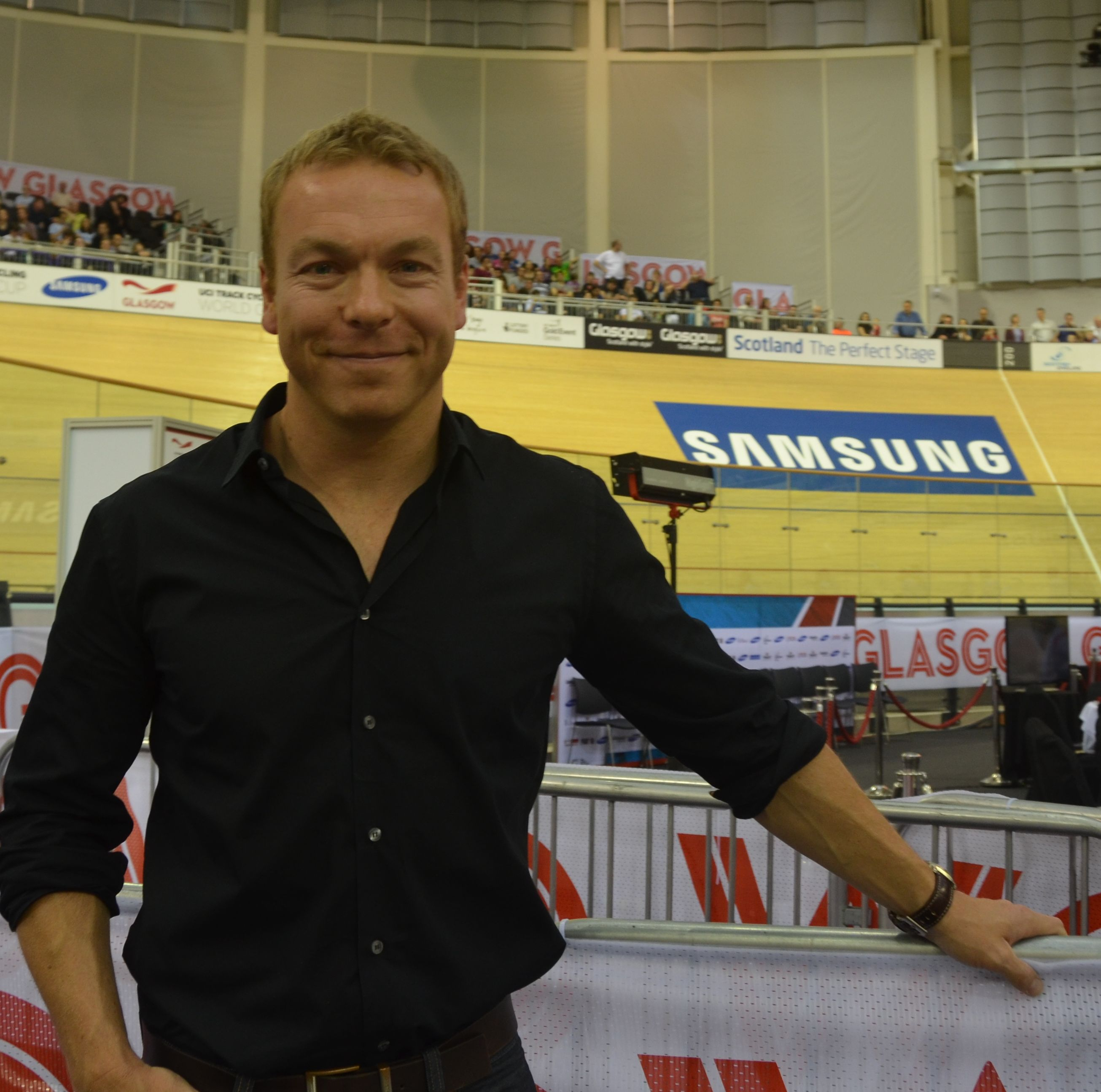 Chris Hoy, britischer Radsportler